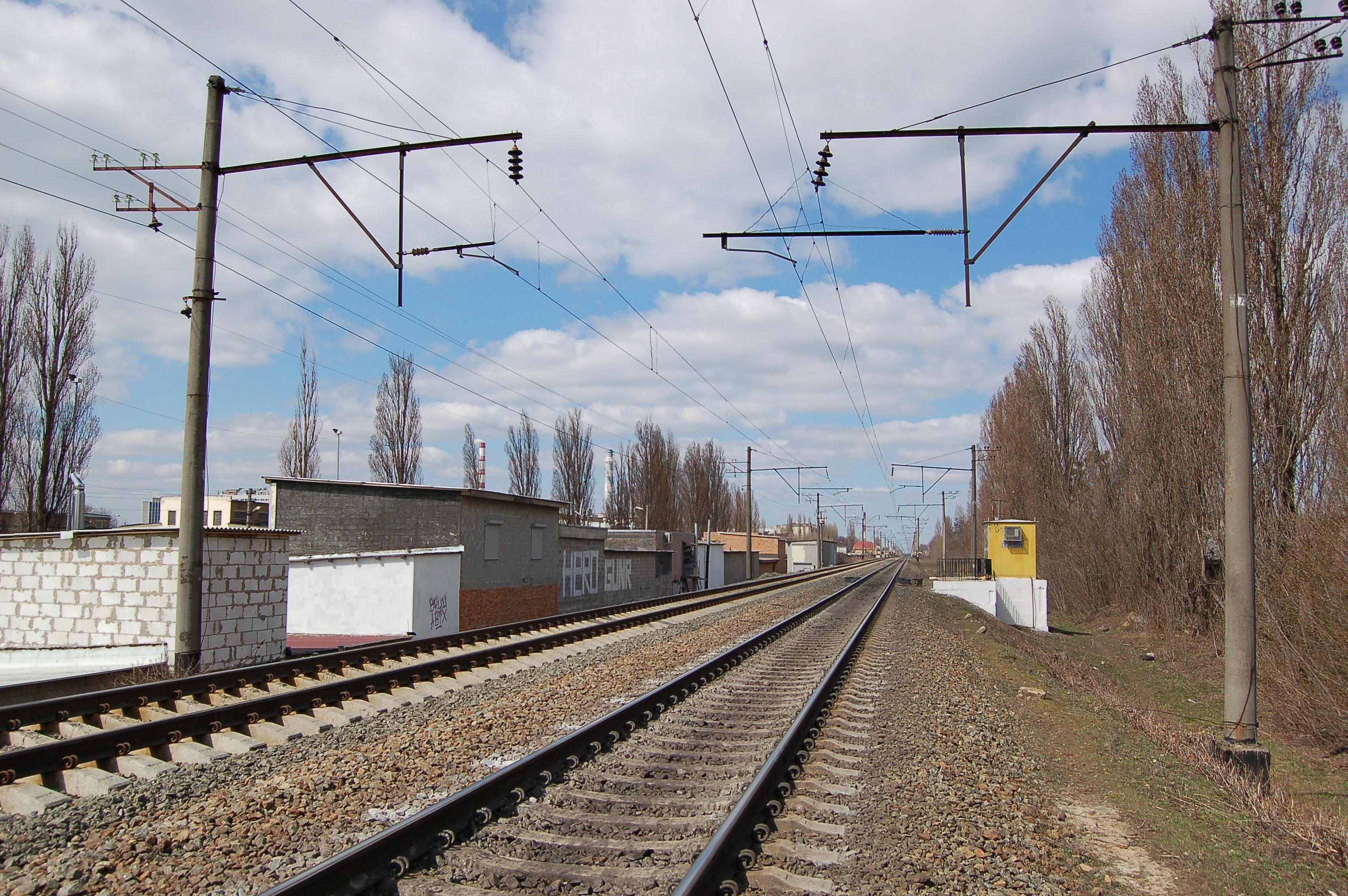 Місцезнаходження колишньої залізничної платформи Академмістечко у Києві